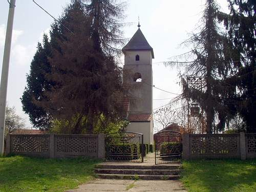 kapelica u centru Dijaneša